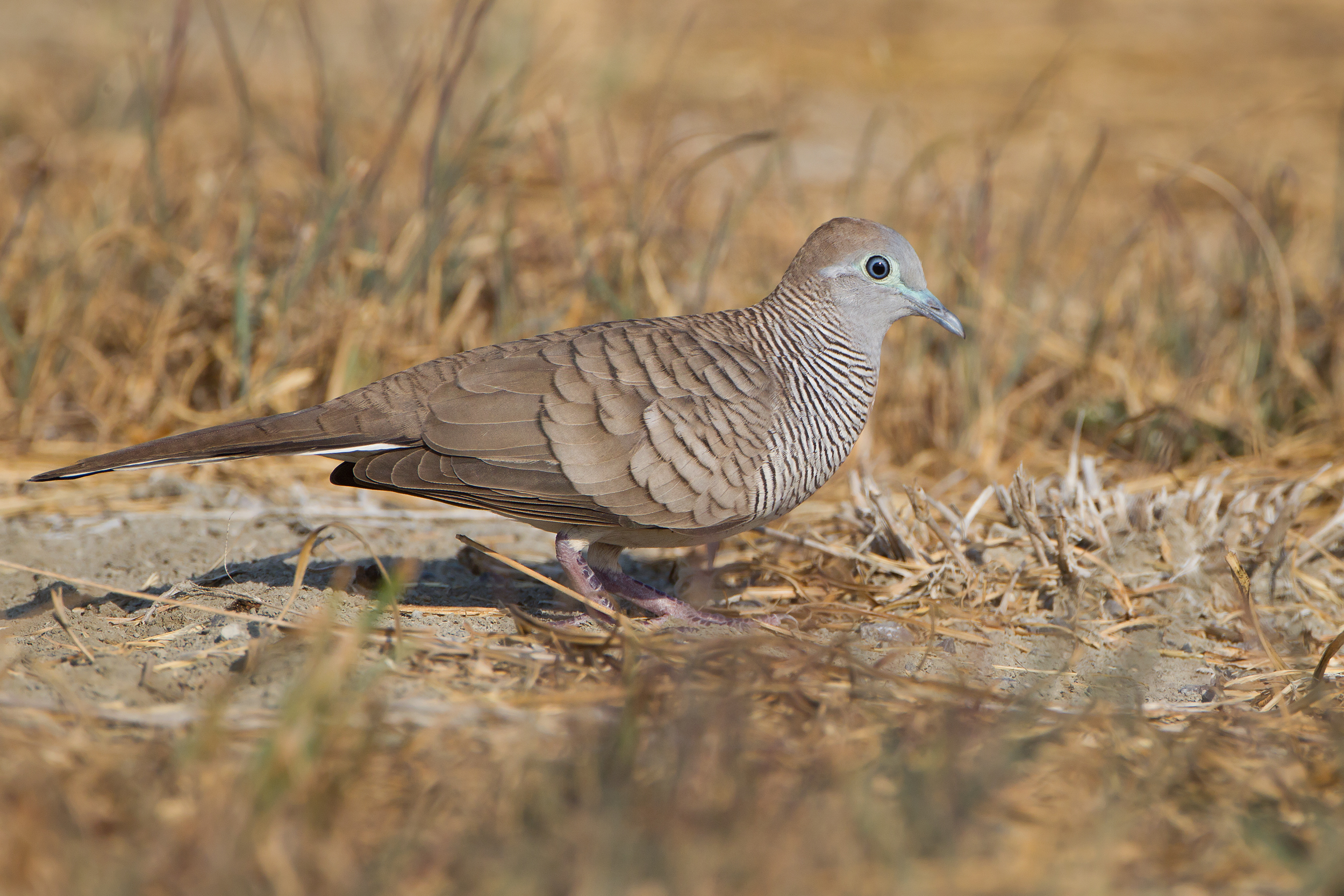 Zebra Dove (Geopelia striata), Laem Pak Bia, Petchaburi, Thailand